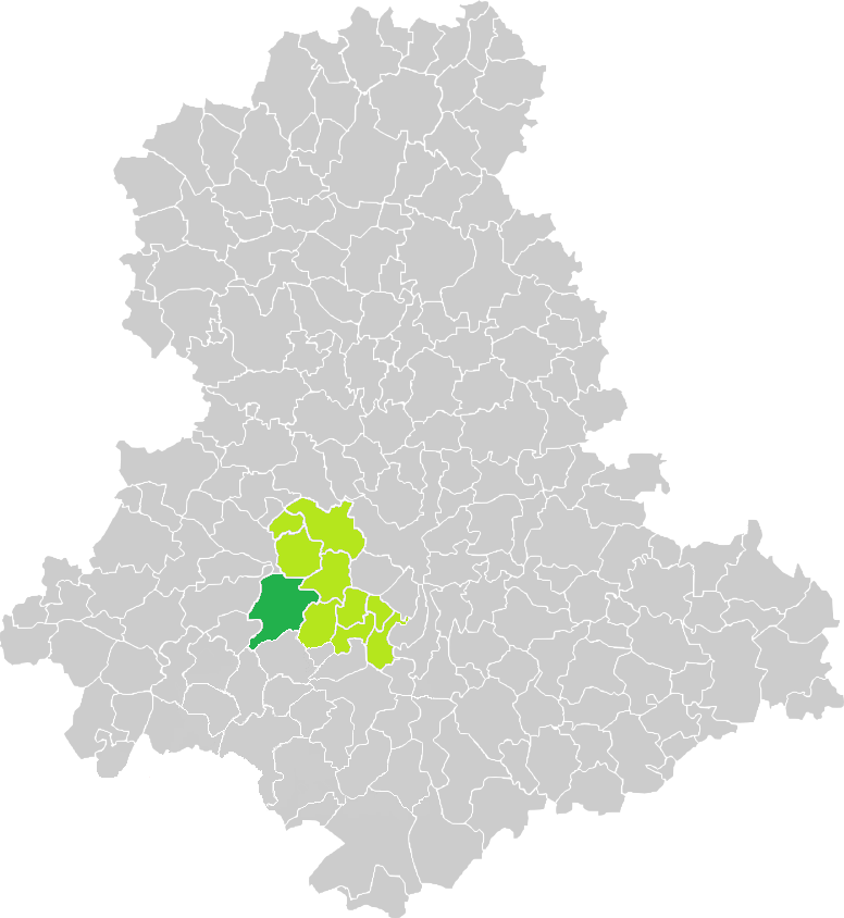 Carte de situation de la commune de Séreilhac (en vert foncé) dans le votre Canton (en vert clair) sur une carte des communes de la Haute-Vienne